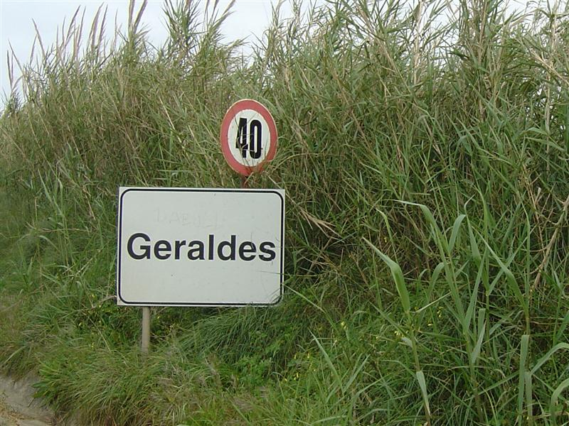 Placa na entrada da Vila de Geraldes